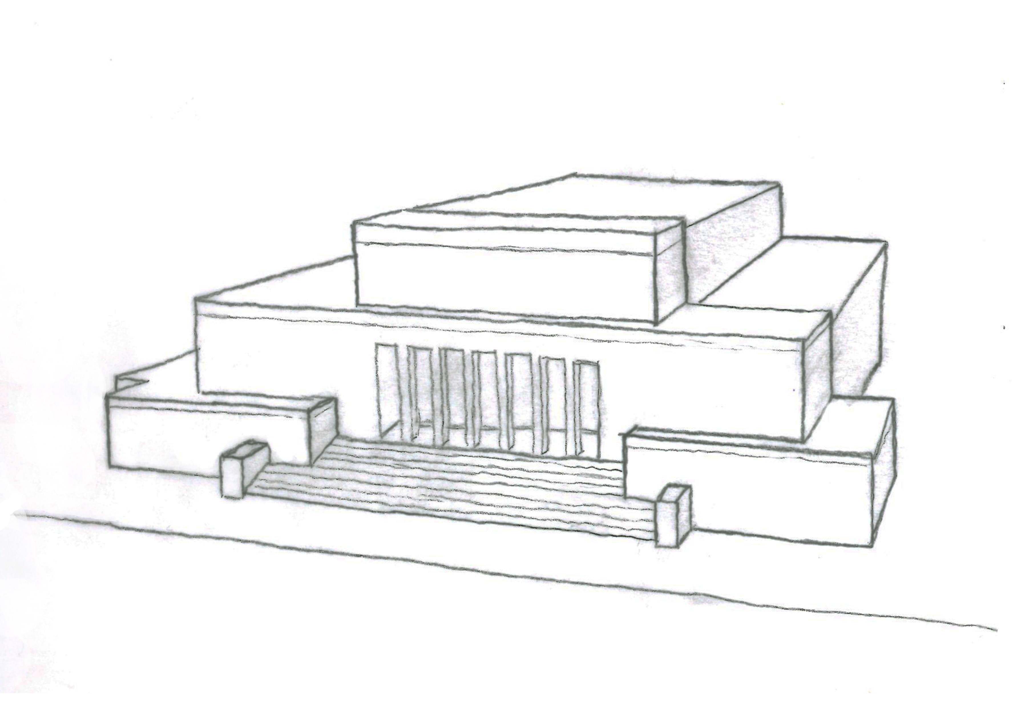 Skizze des Modells der geplanten Stadthalle von Augsburg (Entwurf Thomas Wechs)